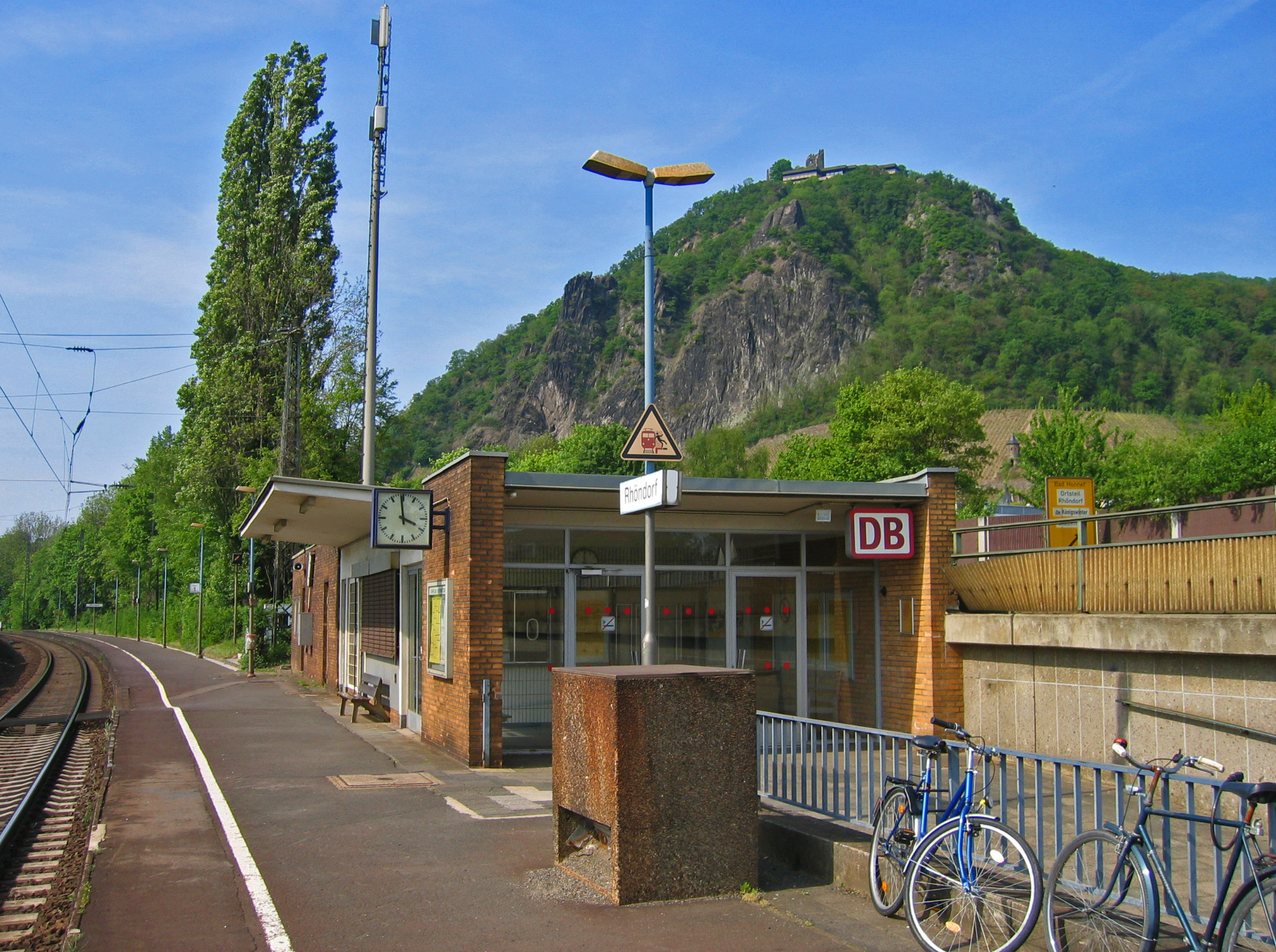 Bahnhof Rhöndorf (Rechte Rheinstrecke)